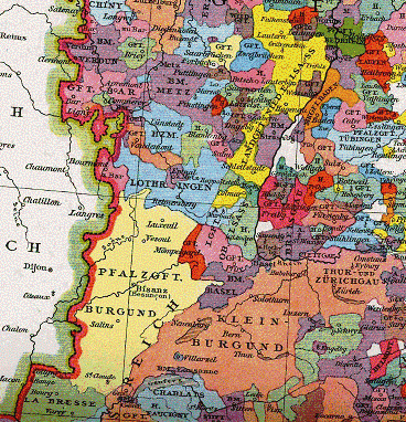 Herzogtum Lothringen um 1250